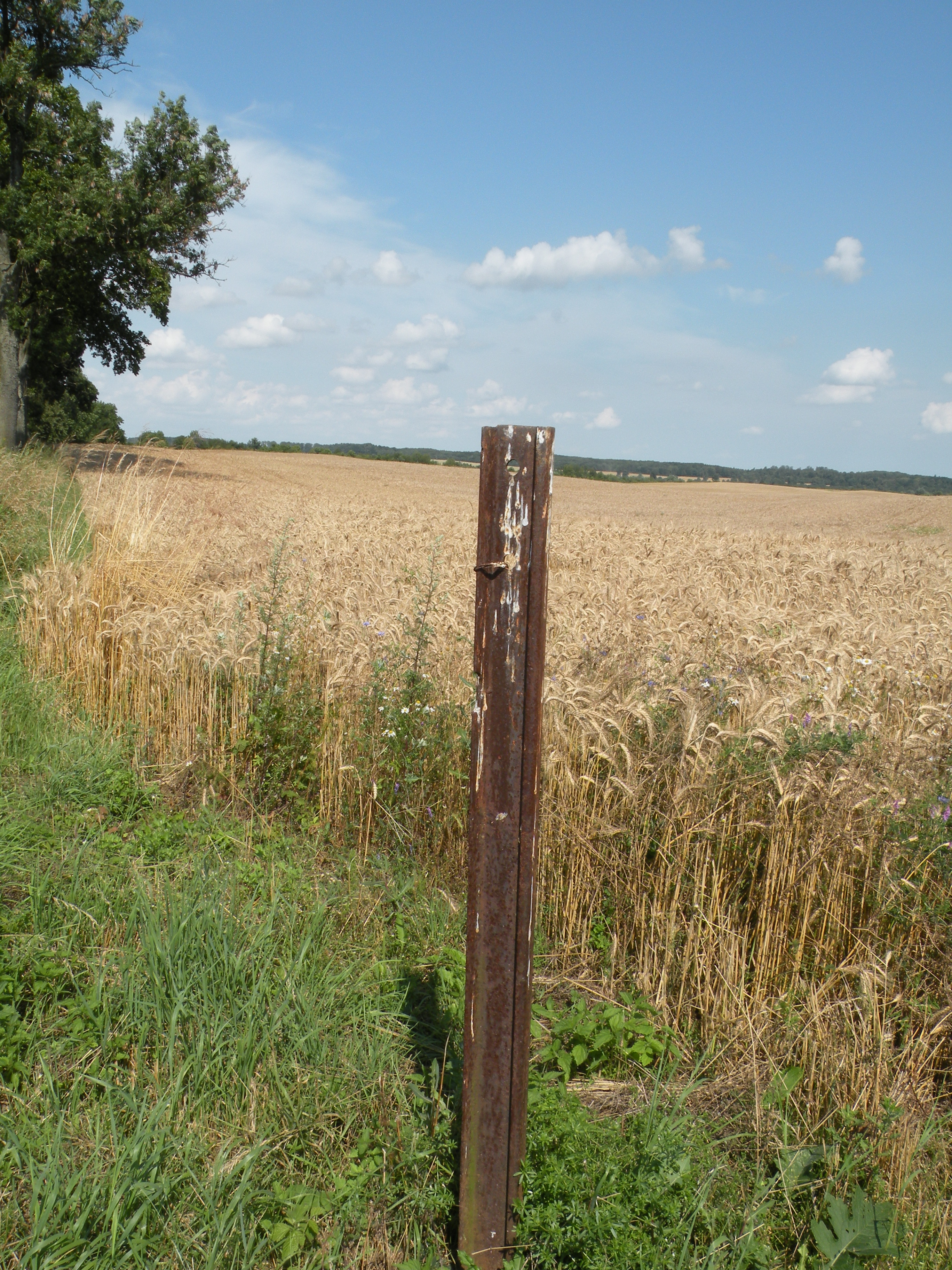 Myślice, fragment szyny z kolei wąskotorowej jako słupek na polu, droga z Myślic do pudłowca